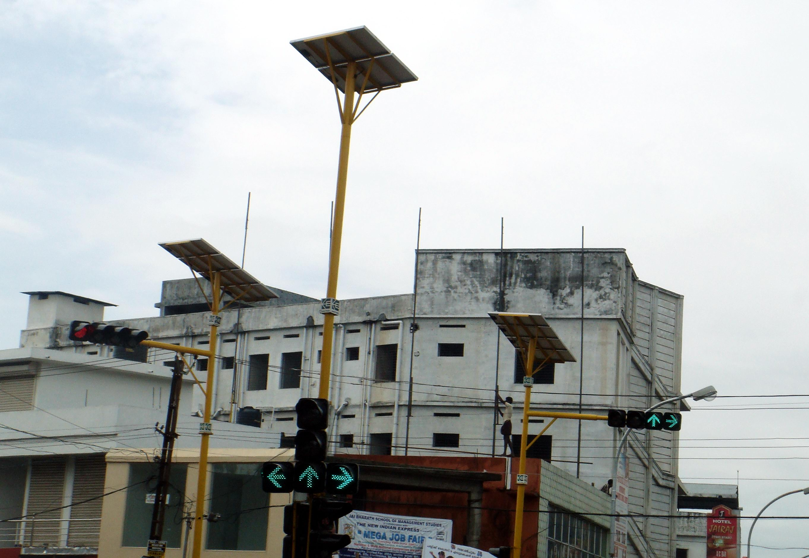 സൌരോർജ്ജ‍ഫലകങ്ങൾ